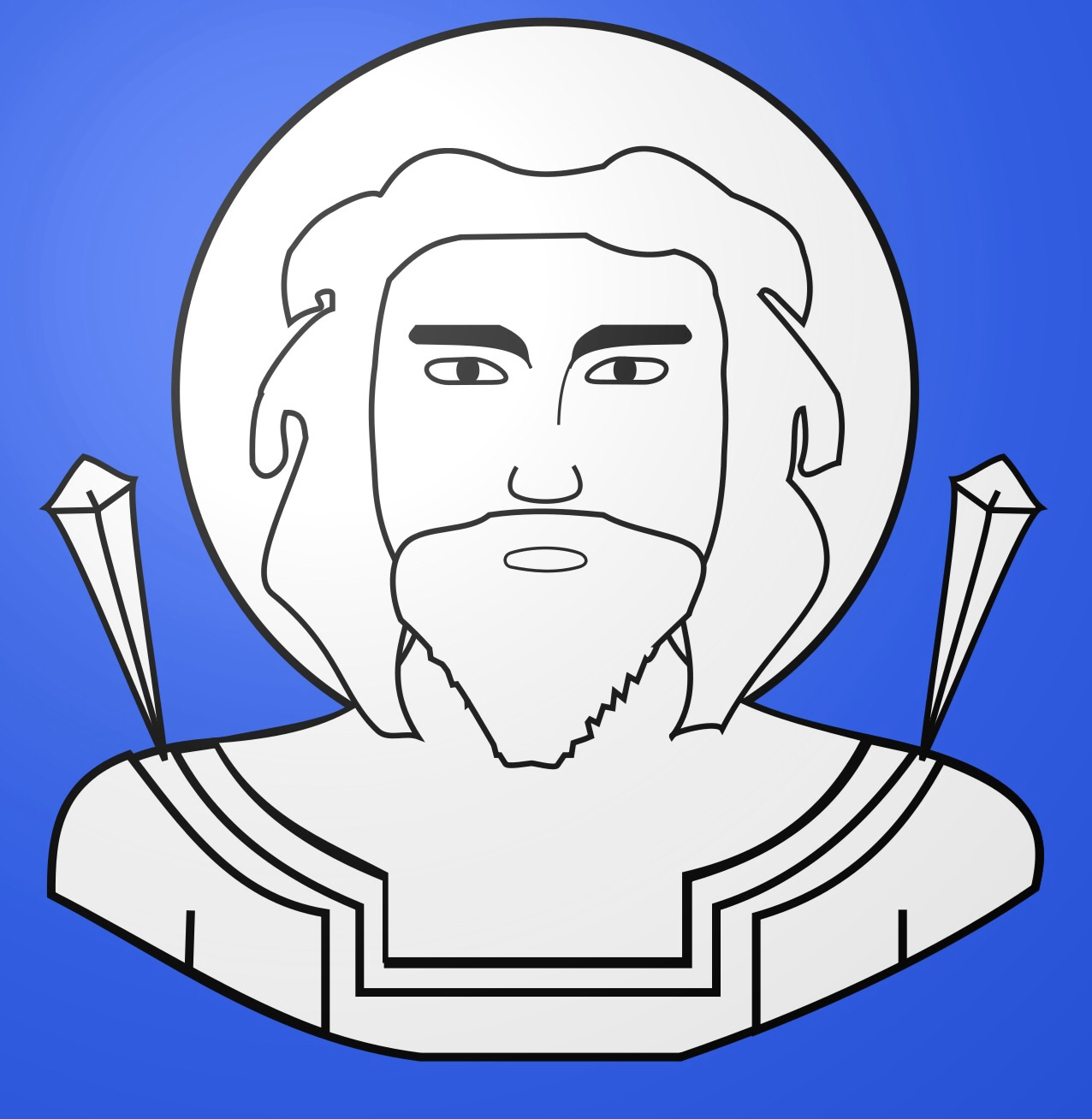 meuble héraldique : buste de saint quentin